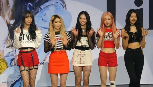 28일 오후 서울시 송파구 올림픽공원 K아트홀에서 프리스틴의 첫 유닛, 프리스틴 V(PRISTIN V)의 신규 싱글 앨범 ‘Like a V’ 발매 기념 쇼케이스가 열렸다.